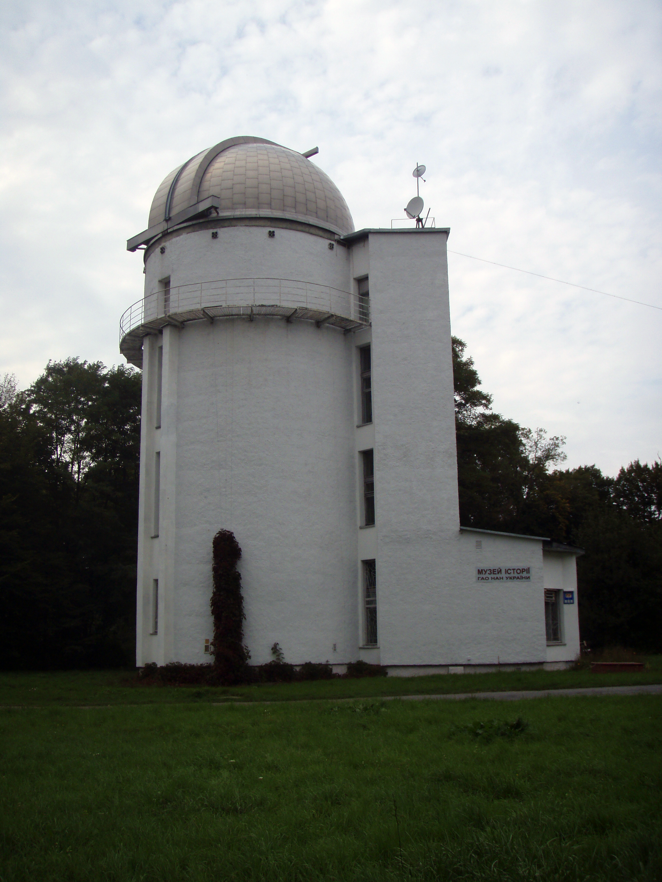 Україна, Київ - Головна обсерваторія НАН України в Голосіївському лісі